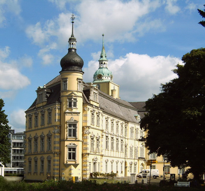 Castle in Oldenburg (Oldb)